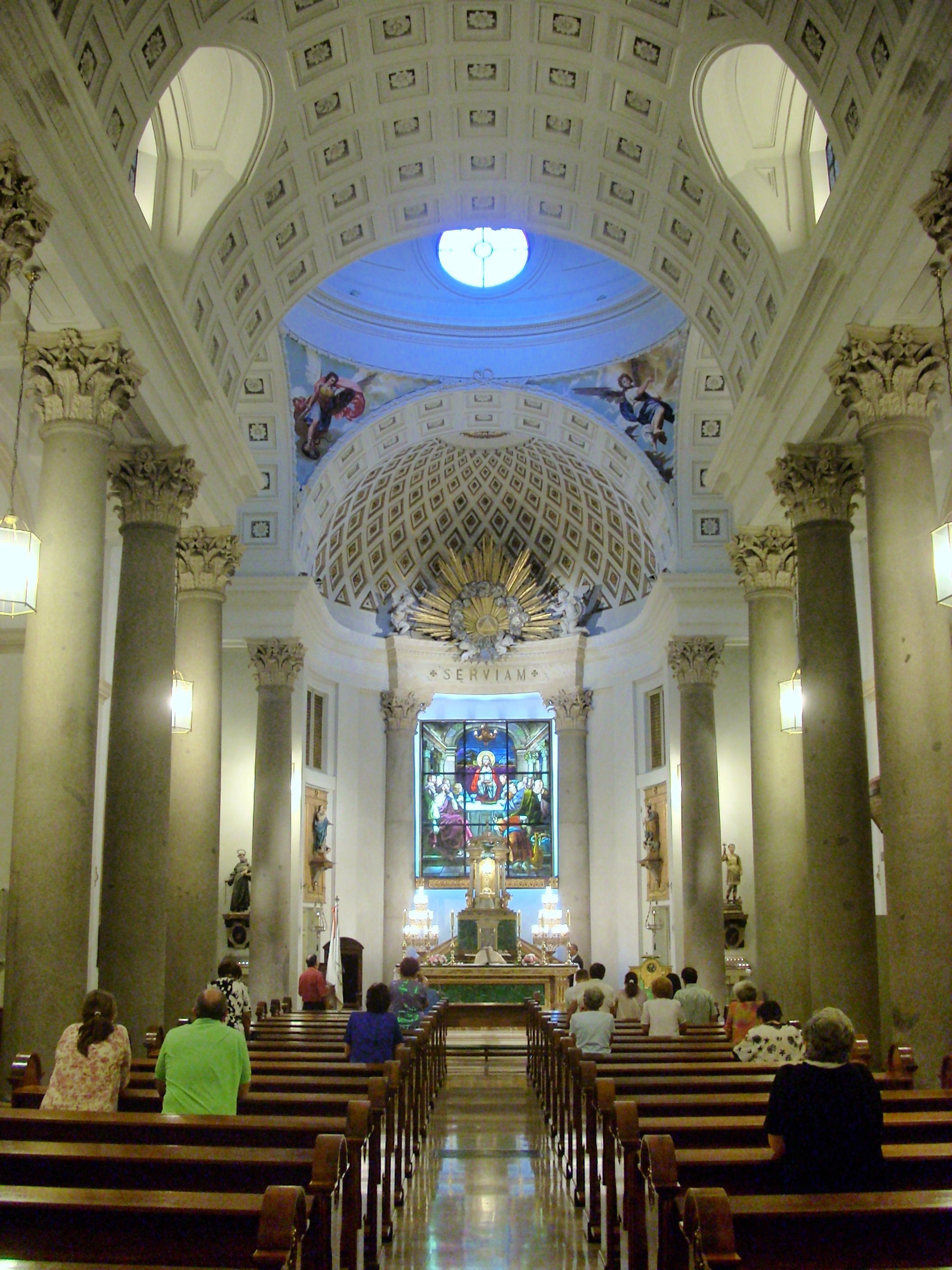 Interior del oratorio del Caballero de Gracia, Madrid